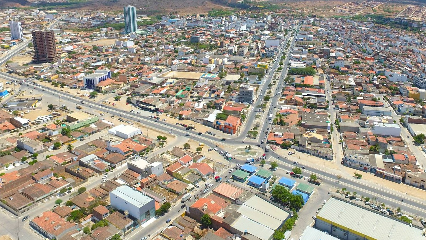 Avenida 29 de Dezembro